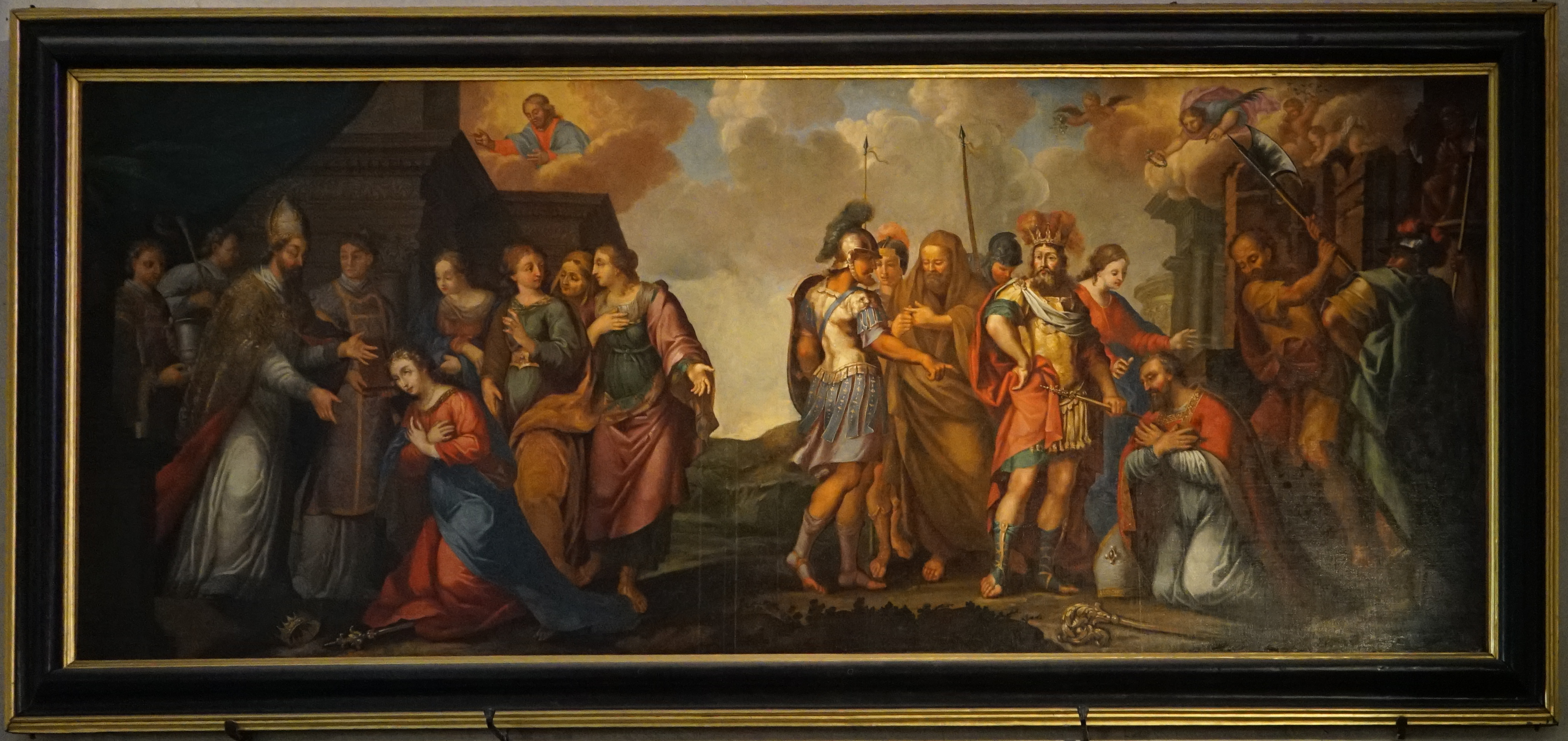 dans le transept nord de l'Église Saint-Léger de Cognac.